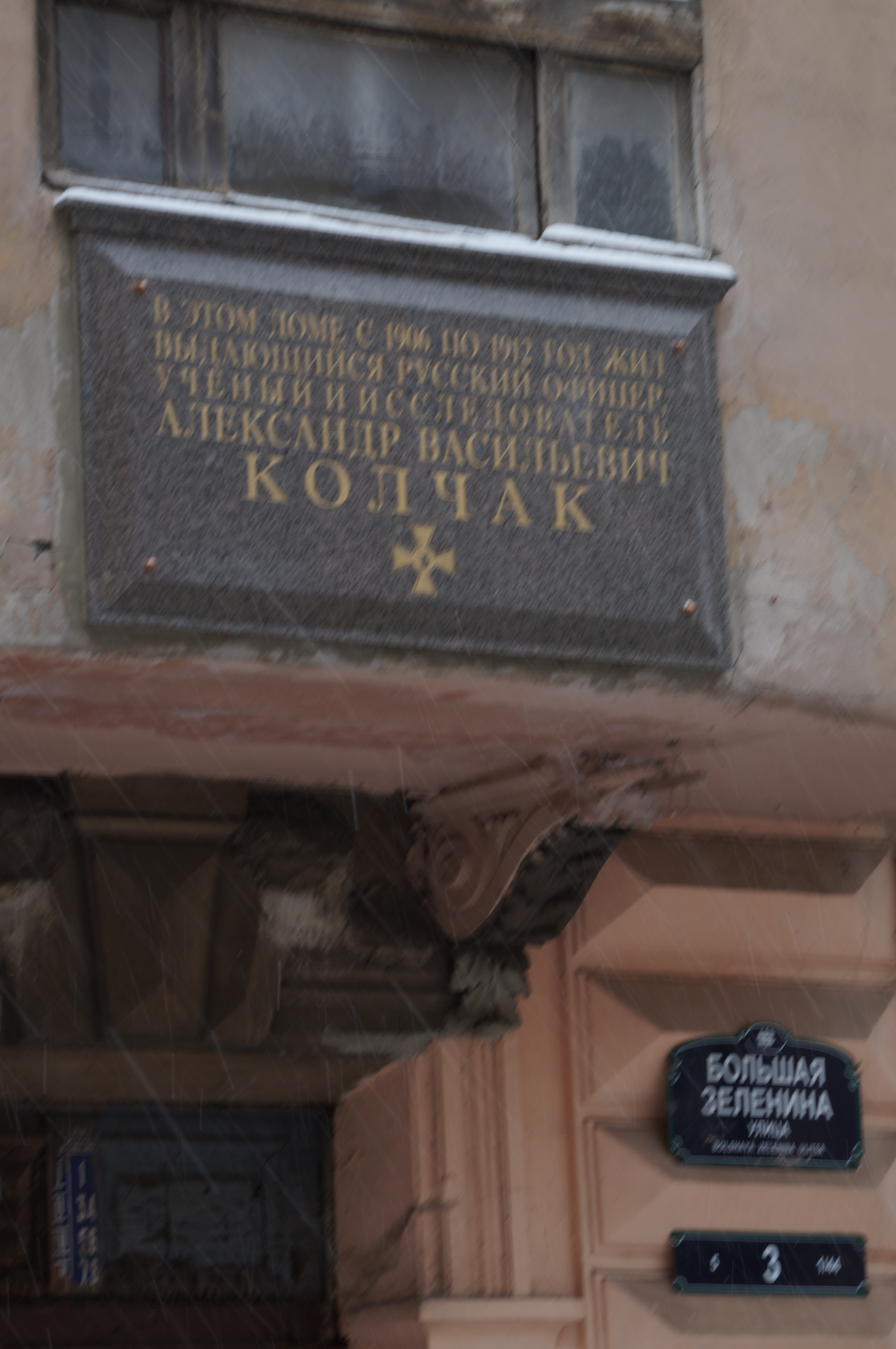 Мемориальная доска адмиралу А.В. Колчаку в СПб. на ул. Зеленина, д.3